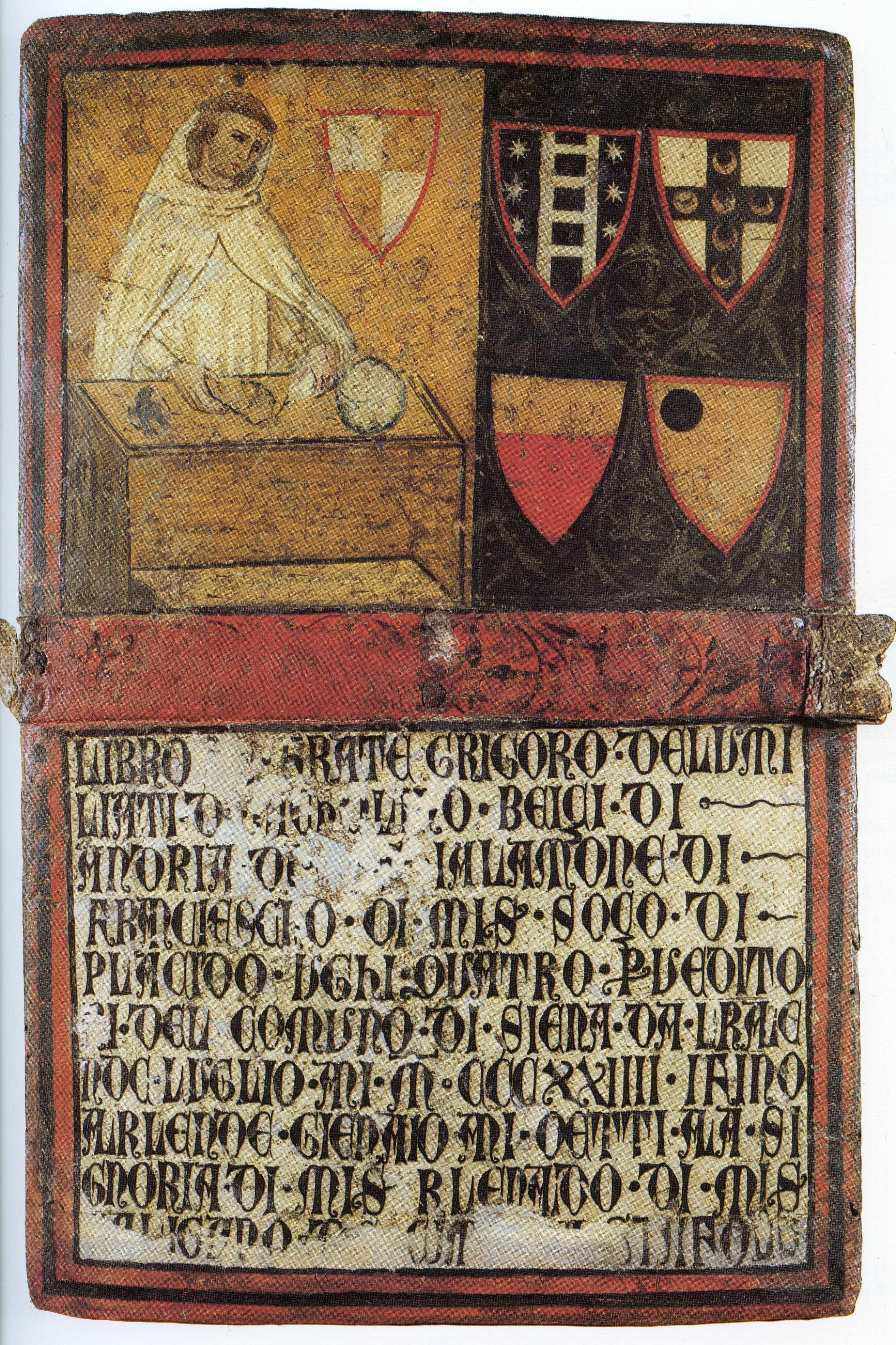 Don Gregorio, Monaco Umiliati (Camerlengo) - Tablet Biccherna 1324